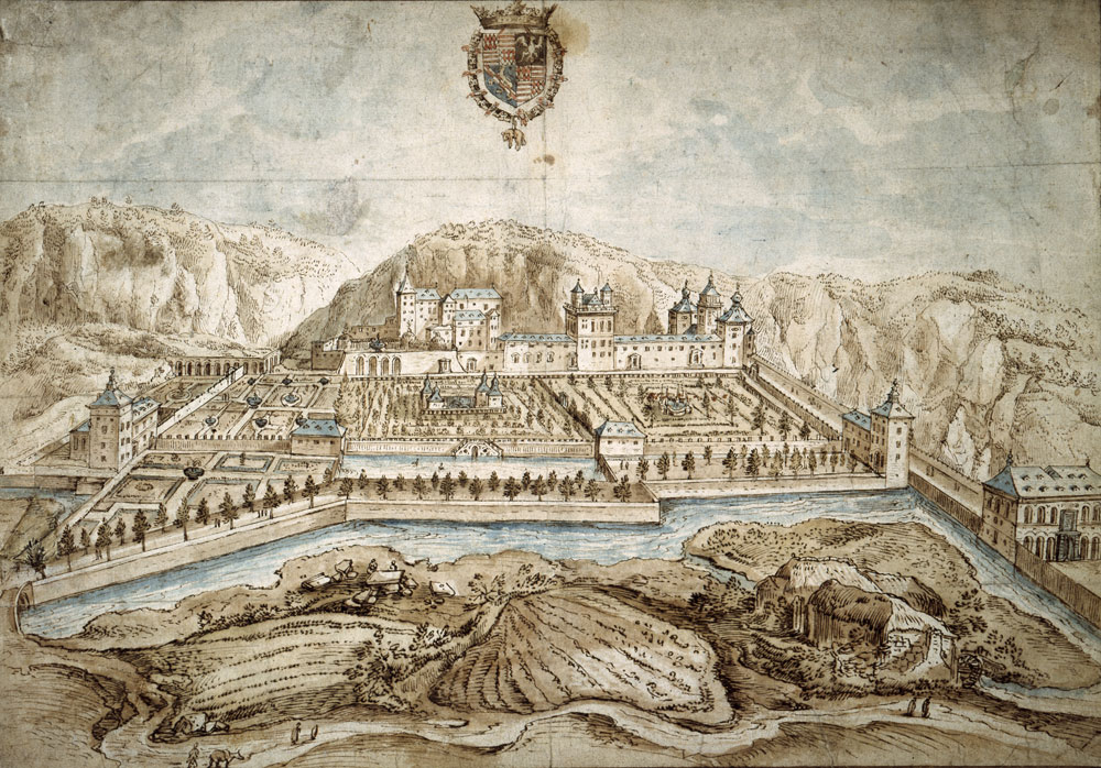 Panorama des Schlosses La Fontaine (auch Schloss Mansfeld oder Palais Mansfeld genannt) in Luxemburg-Clausen, colorierte Zeichnung im Musée National d'Histoire et d'Art, Luxembourg